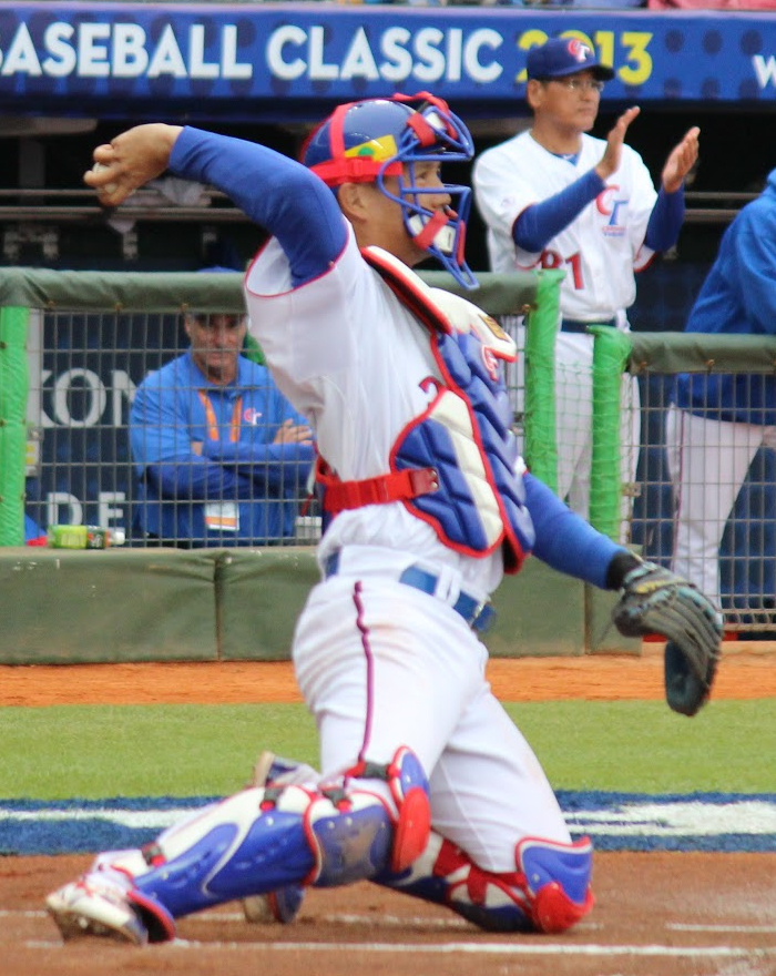 Chih-kang Kao